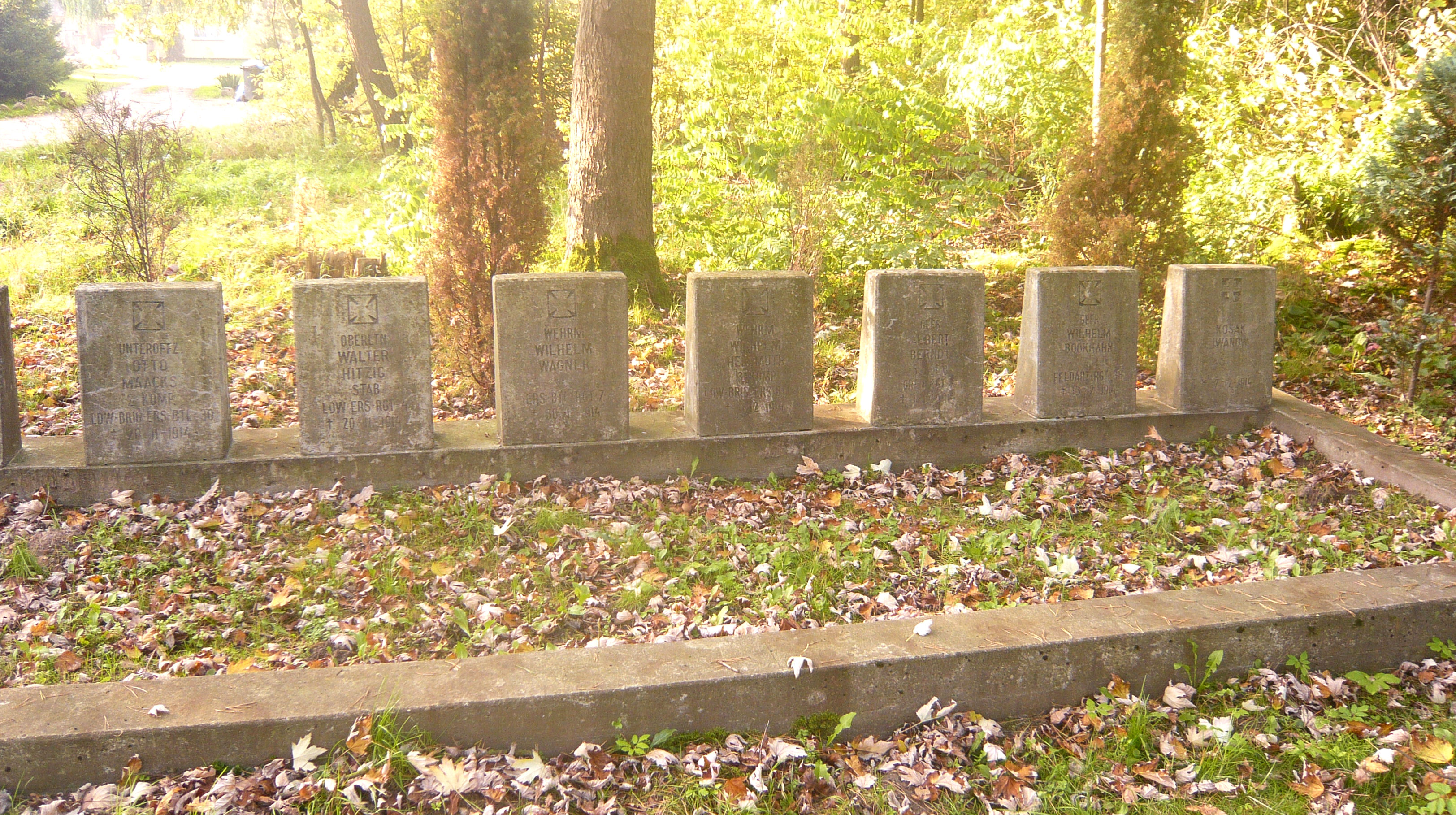 Cmentarz wojenny w Stawiszcze